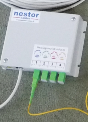 Neljä porttinen kuitupääte